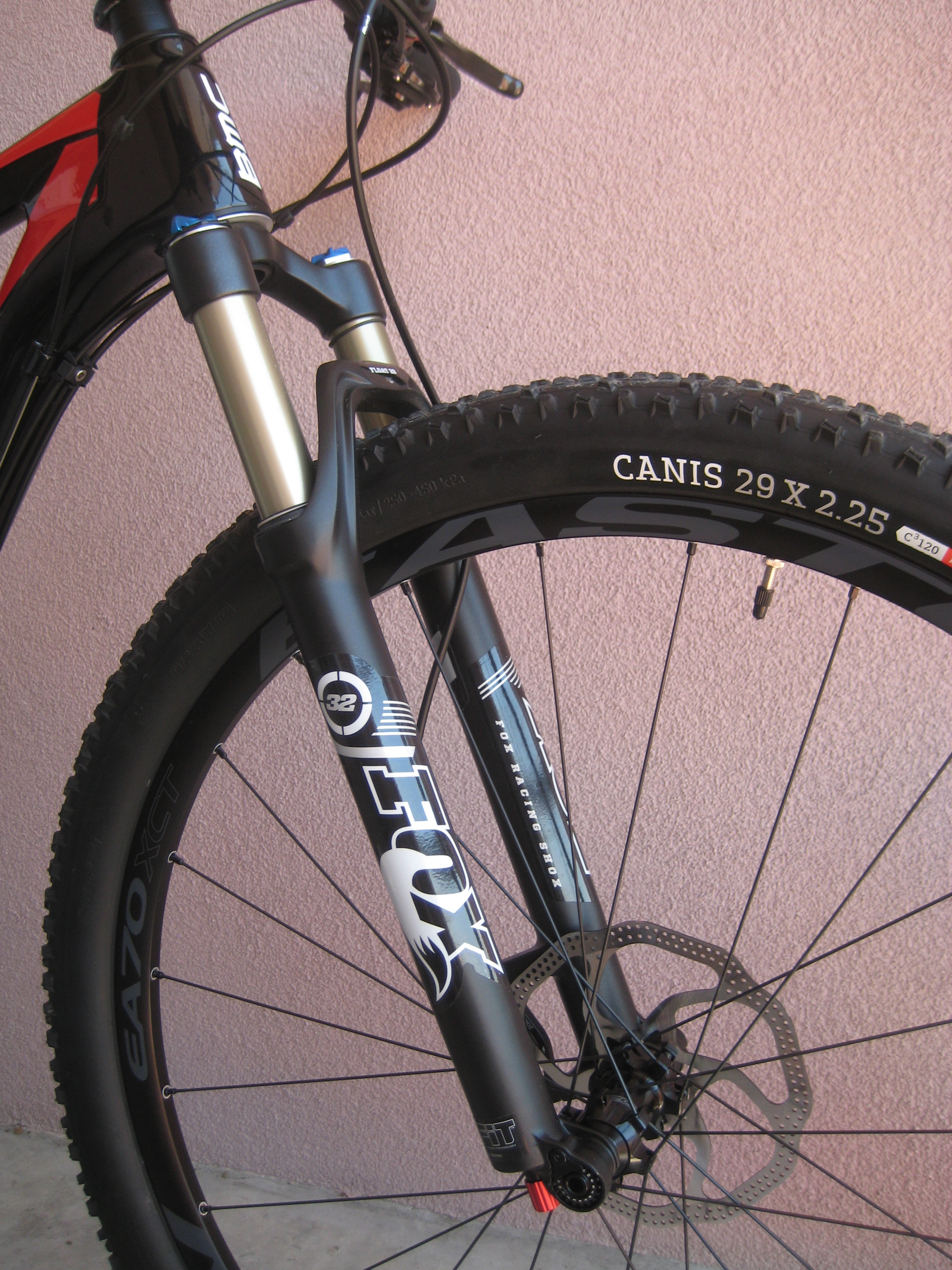 2013 cross-country hardtail mountain bike Team Elite 01 29 by Swiss constructor BMC: fox CTD front suspension